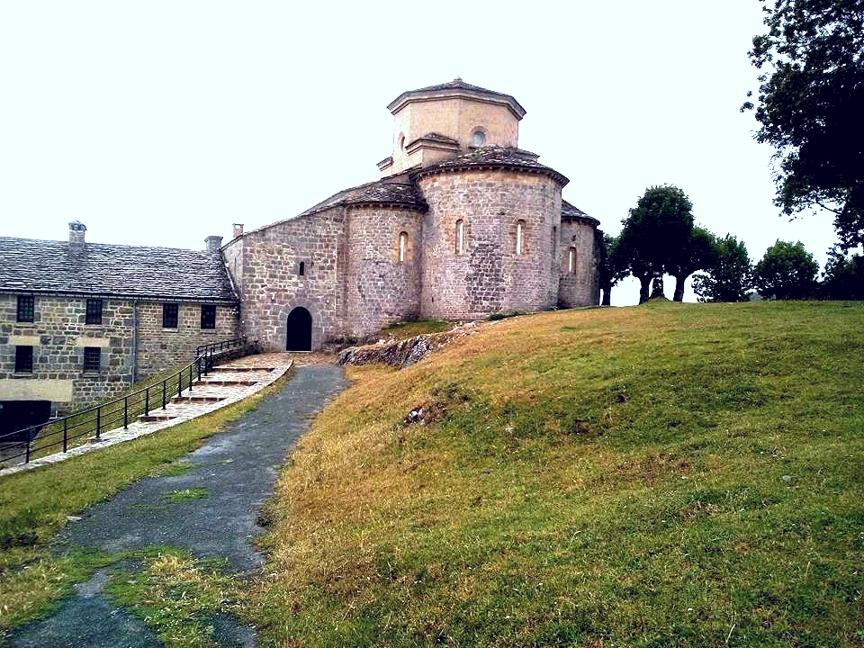 Sanctuaire situé à plus de 1200 métres d'altitude en Navarre